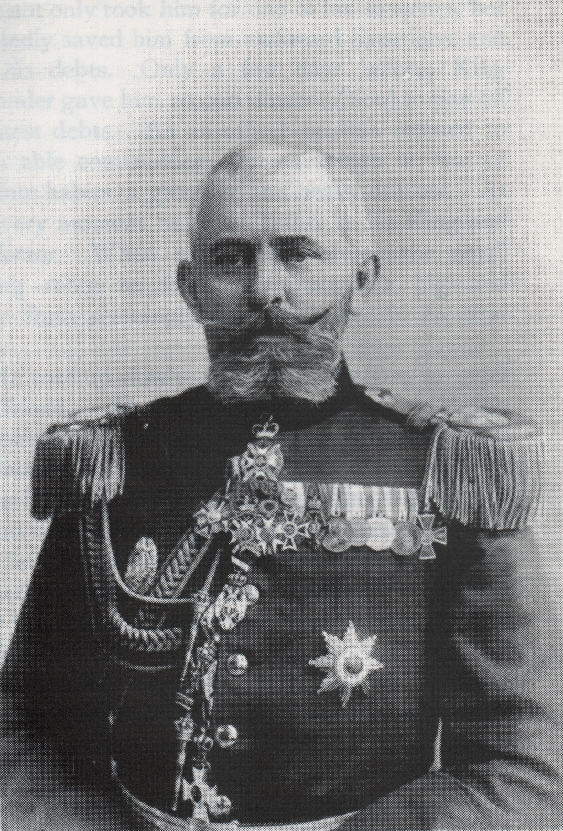 El coronel serbio Alejandro Masin, cabecilla de los golpistas que asaltaron el palacio real y asesinaron al rey Alejandro I de Serbia y a su esposa la reina Draga en 1903.